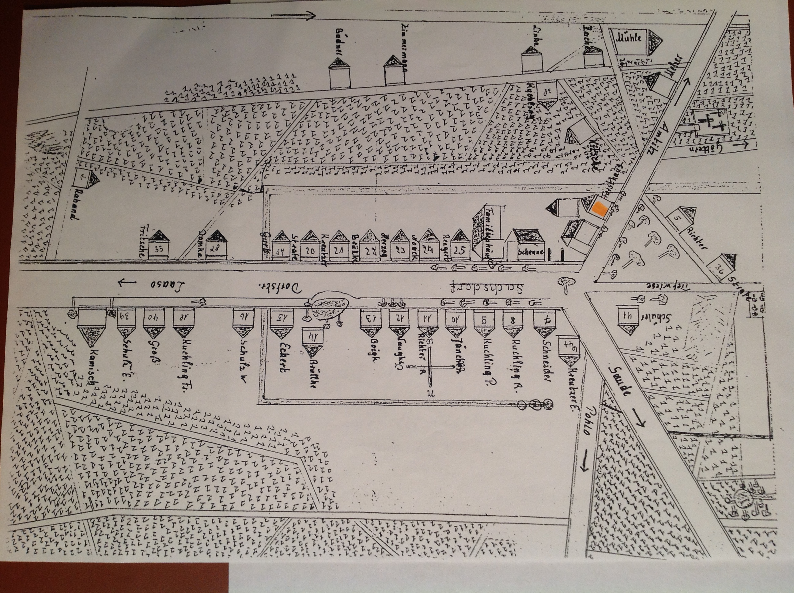 Plan wśi Chęciny,woj:lubuskie.Rok 1945.